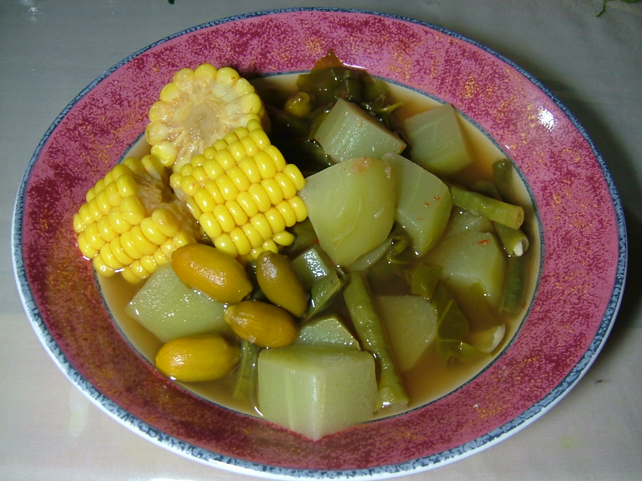 Sayur asem, Indonesian vegetable soup. 「サユ－ル・アッスム」インドネシアの野菜スープ